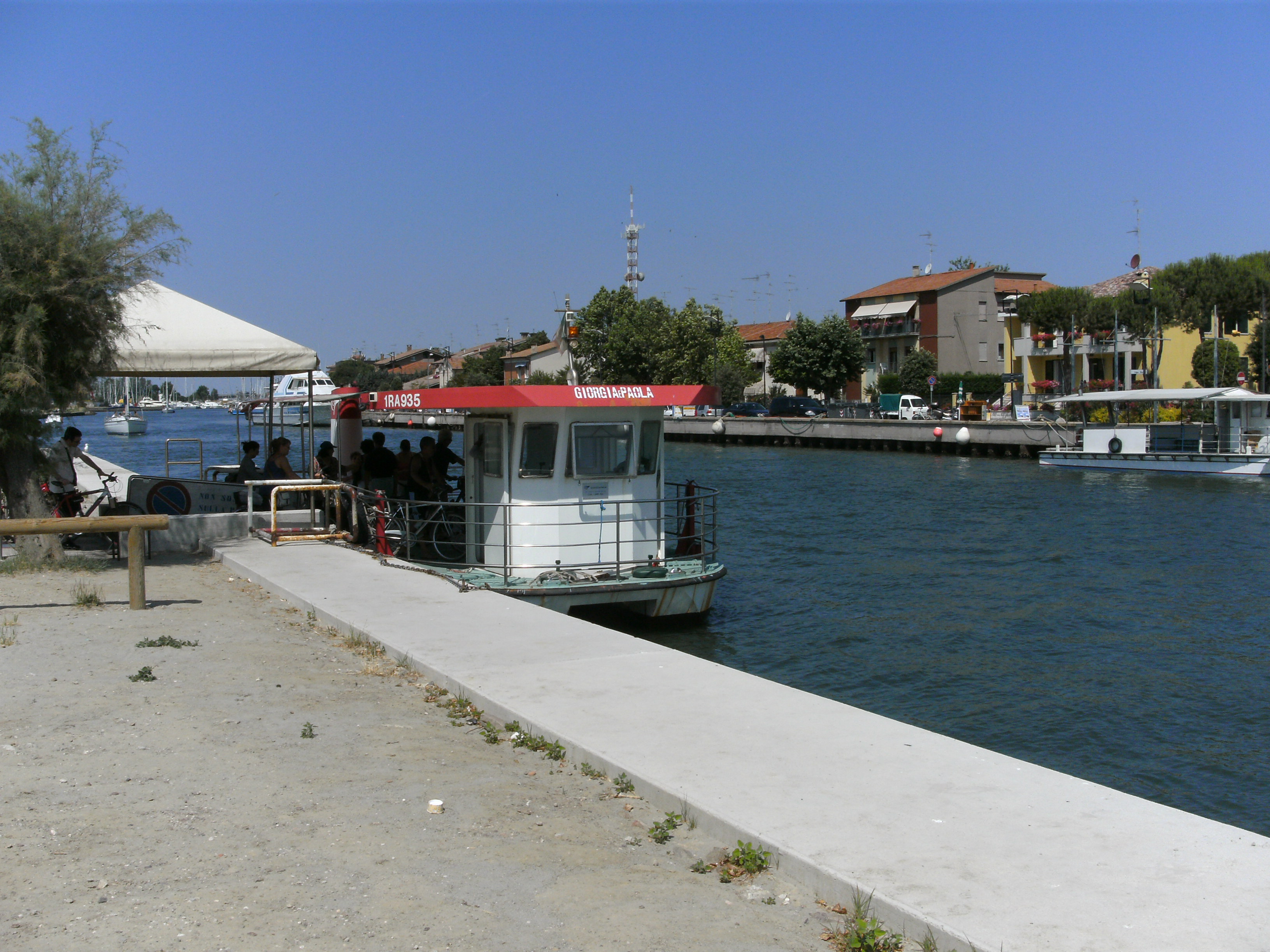 Lido degli Estensi (Comacchio, FE), Anlegestelle der Personenfähre auf der Seite von Estensi am Hafen von Porto Garibaldi